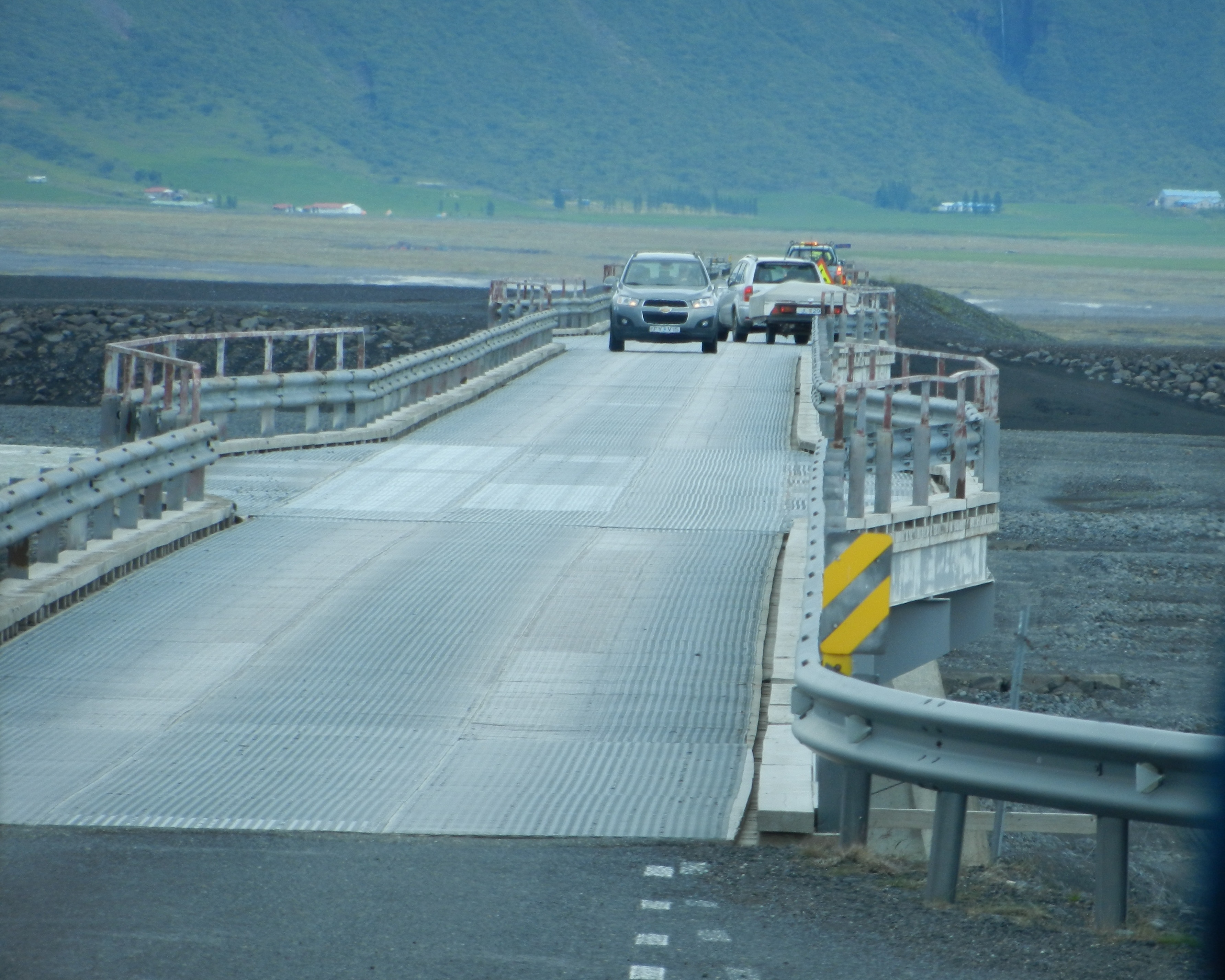 Most čez reko Skeiðará na naplavinah Skeiðarársandur, Islandija.